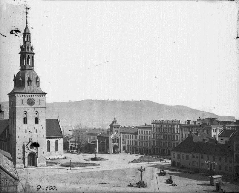 Stortorvet, Fiat Lux, Vår Frelsers kirke, brannvakten, bygårder.